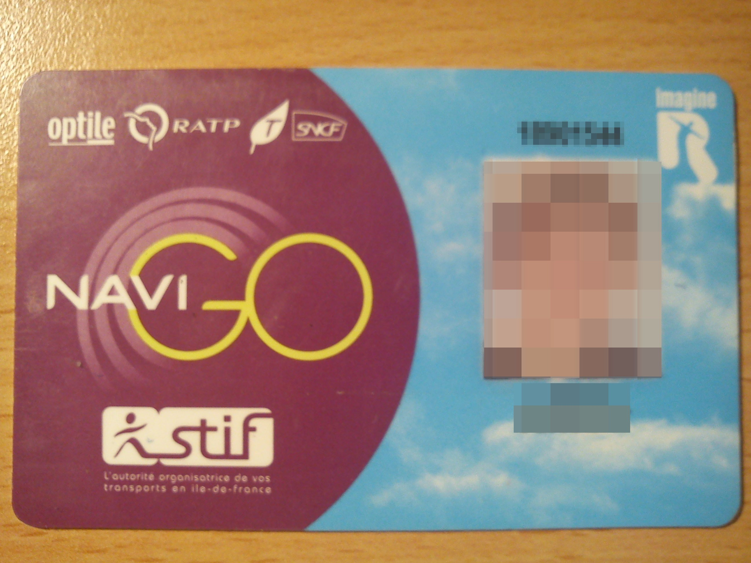 Recto d'un carte imagine'R.